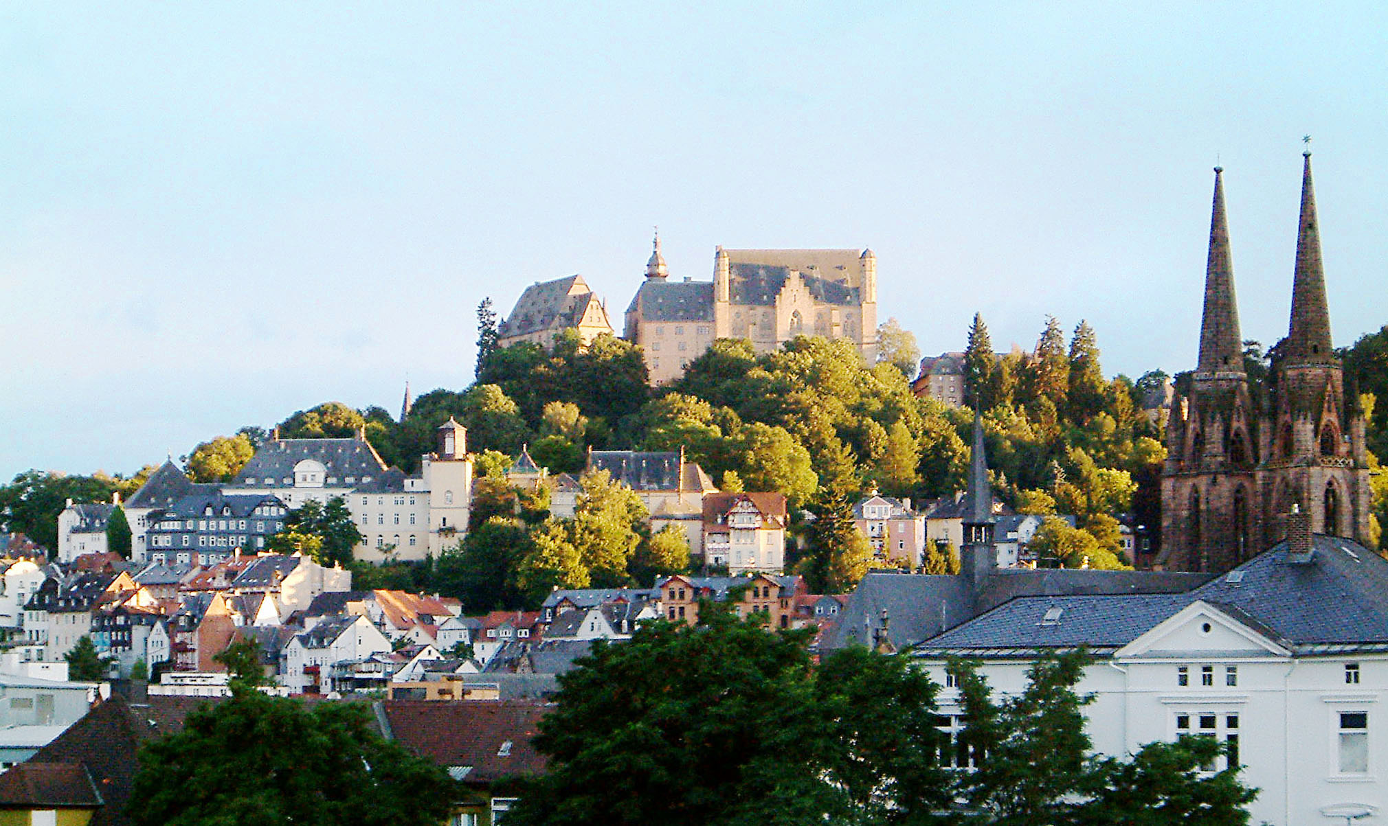 Sicht auf Marburg: Schloss, Oberstadt, Elisabethkirche